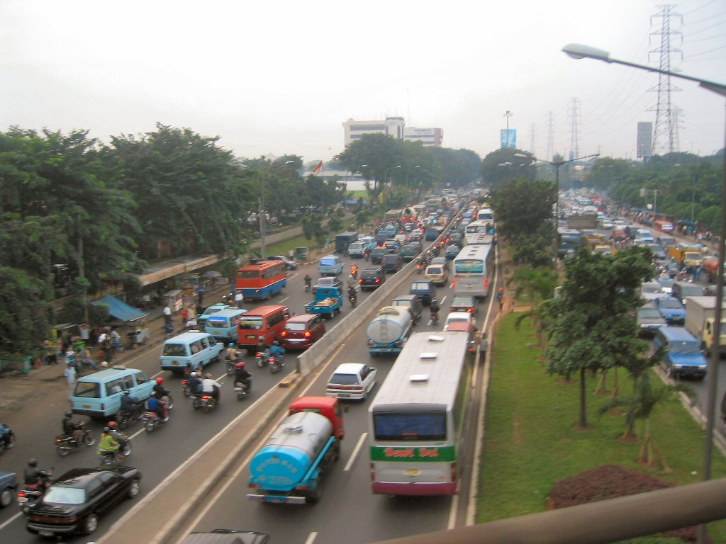 Jakarta verkeersopstopping Foto door mijzelf gemaakt Juli 2005. Vrij te gebruiken.